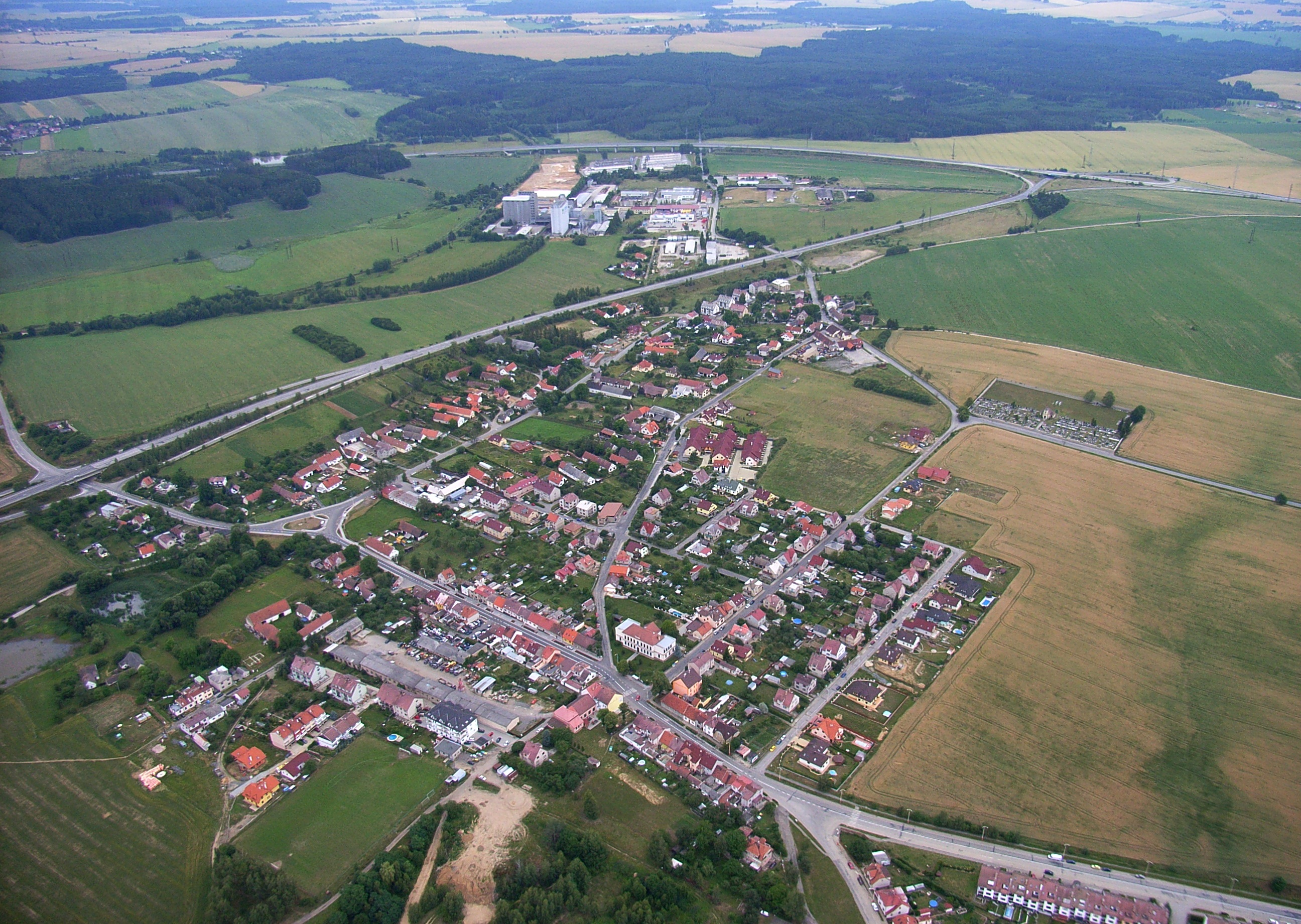 Tábor-místní část Čekanice, letecký pohled (2007)